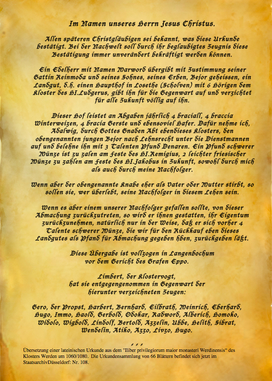 Übersetzung der Urkunde von 1060/1080